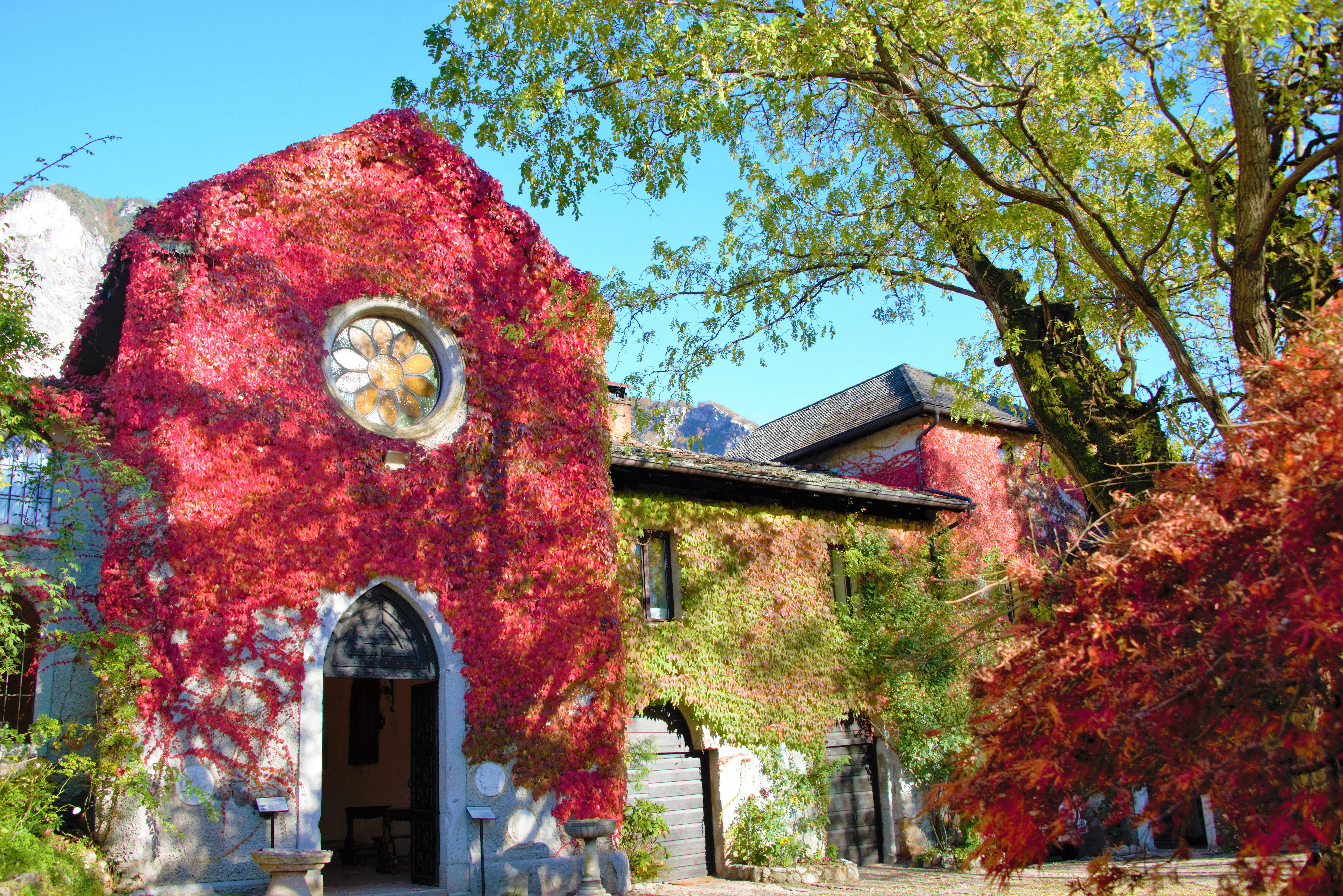 Castel Ivano This is a photo of a monument which is part of cultural heritage of Italy.